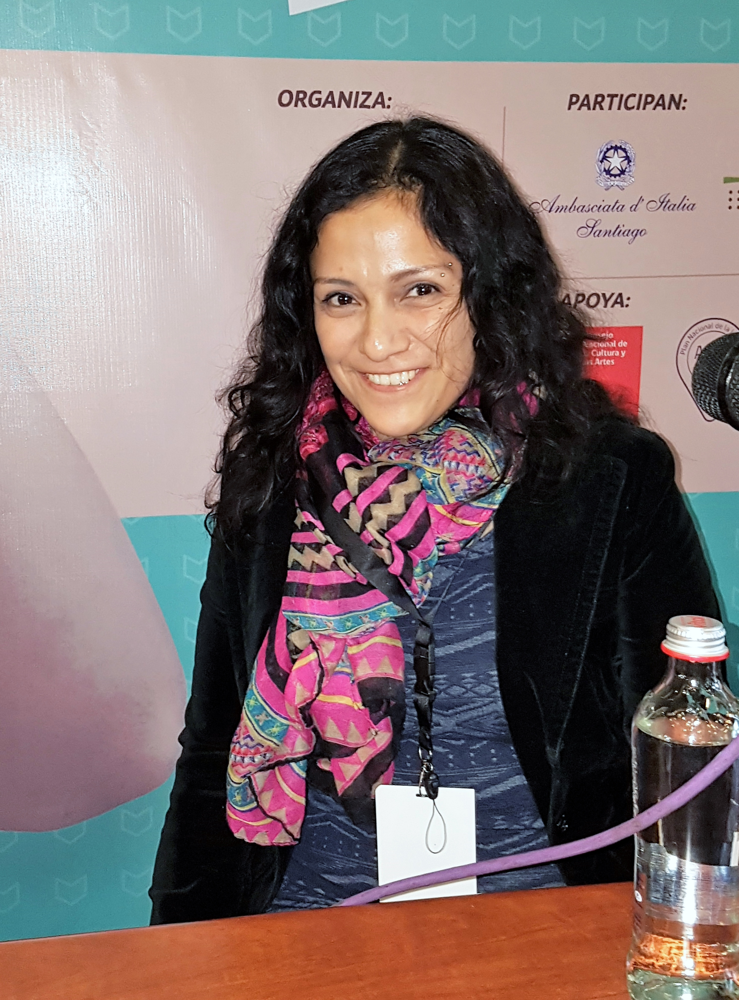 La escritora peruana Claudia Ulloa Donoso (Lima, 1979) en la Feria Internacional del Libro de Santiago 2017.